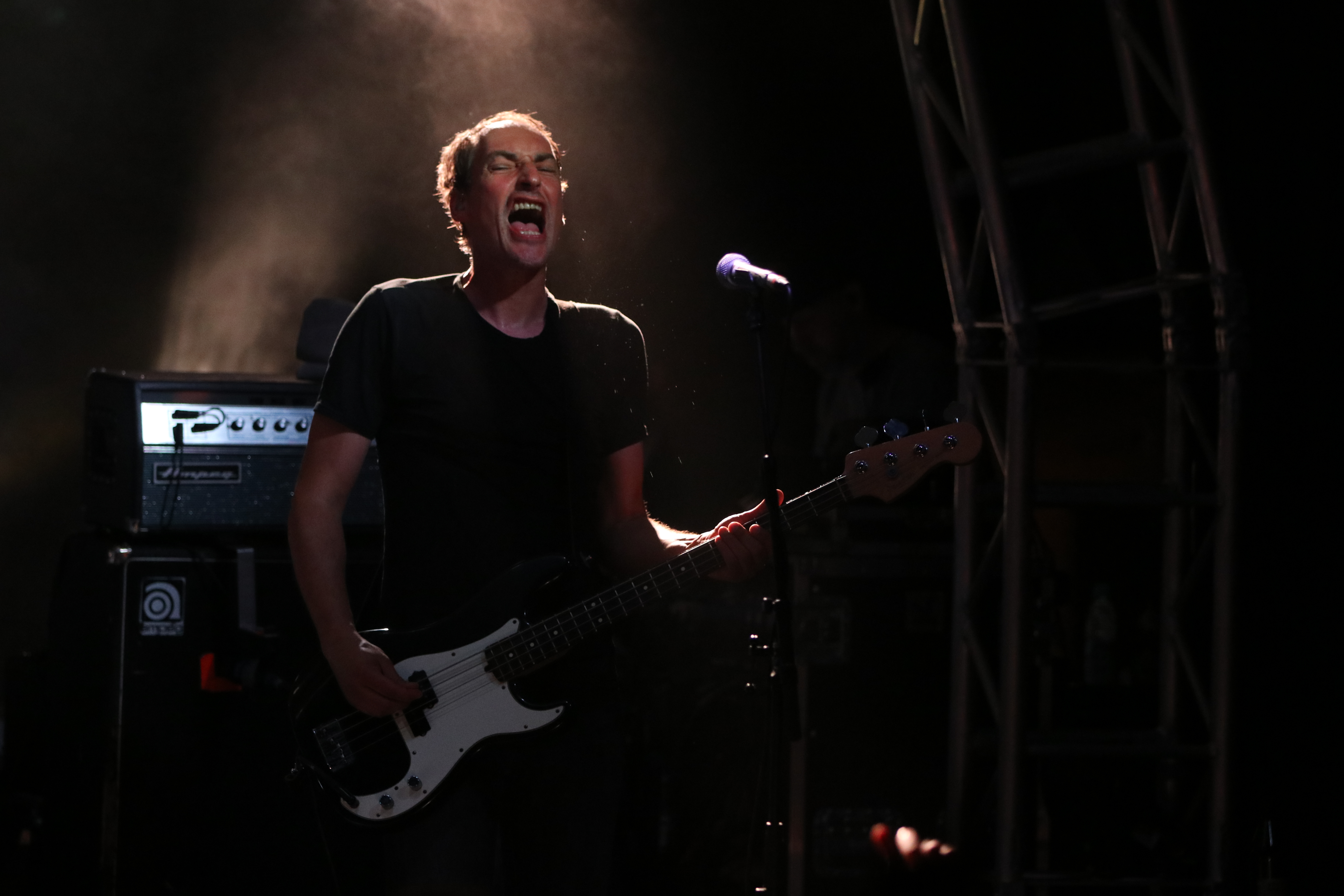 Kettcar am 17. August 2018 im Münchner Theatron. Reimer Bustorff